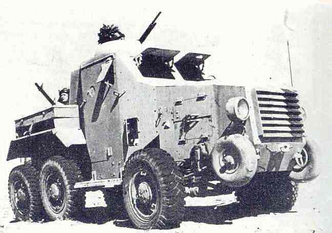 Laffly 15TOE